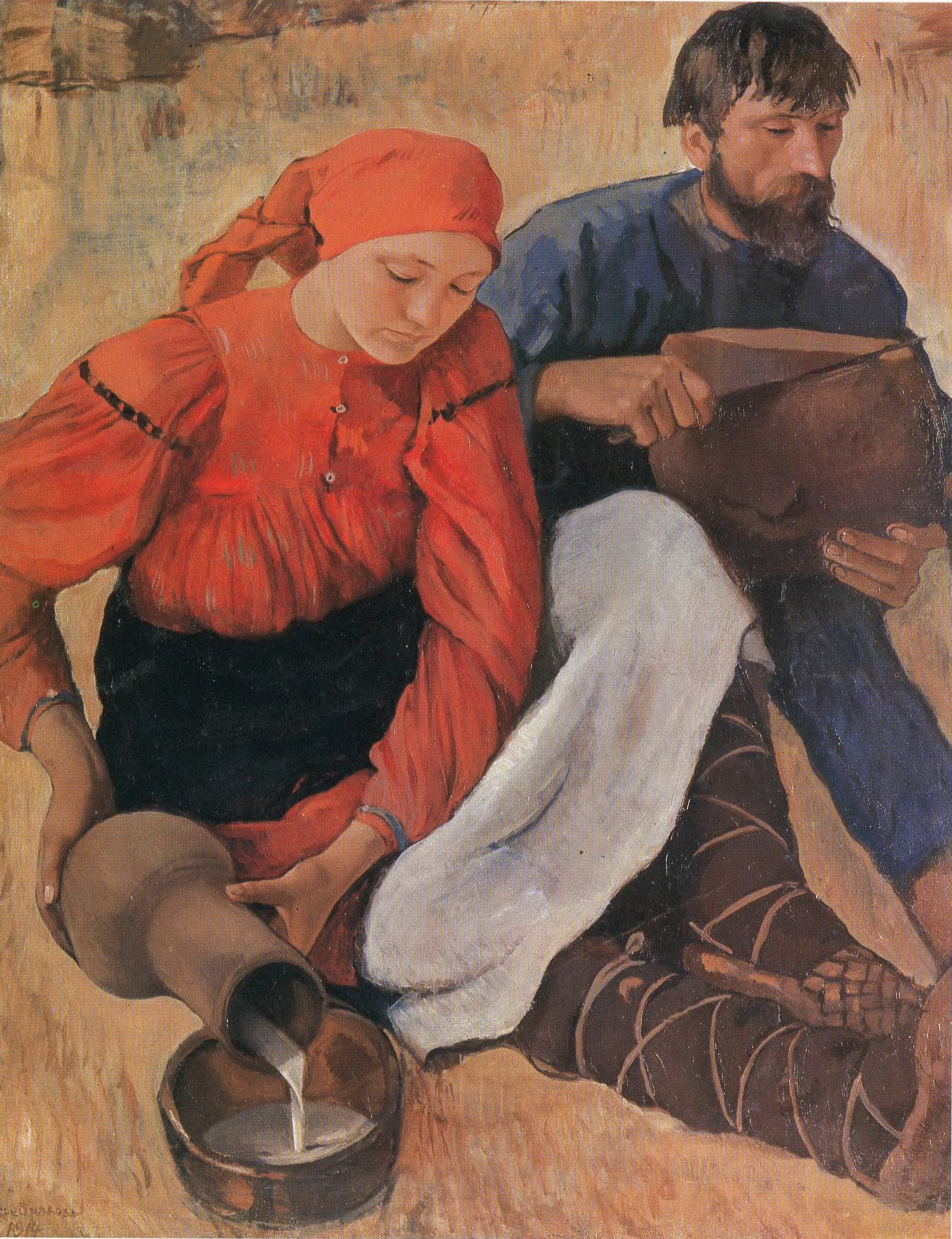 Серебрякова Зинаида Евгеньевна. «Крестьяне». Фрагмент варианта картины "Жатва". ГРМ